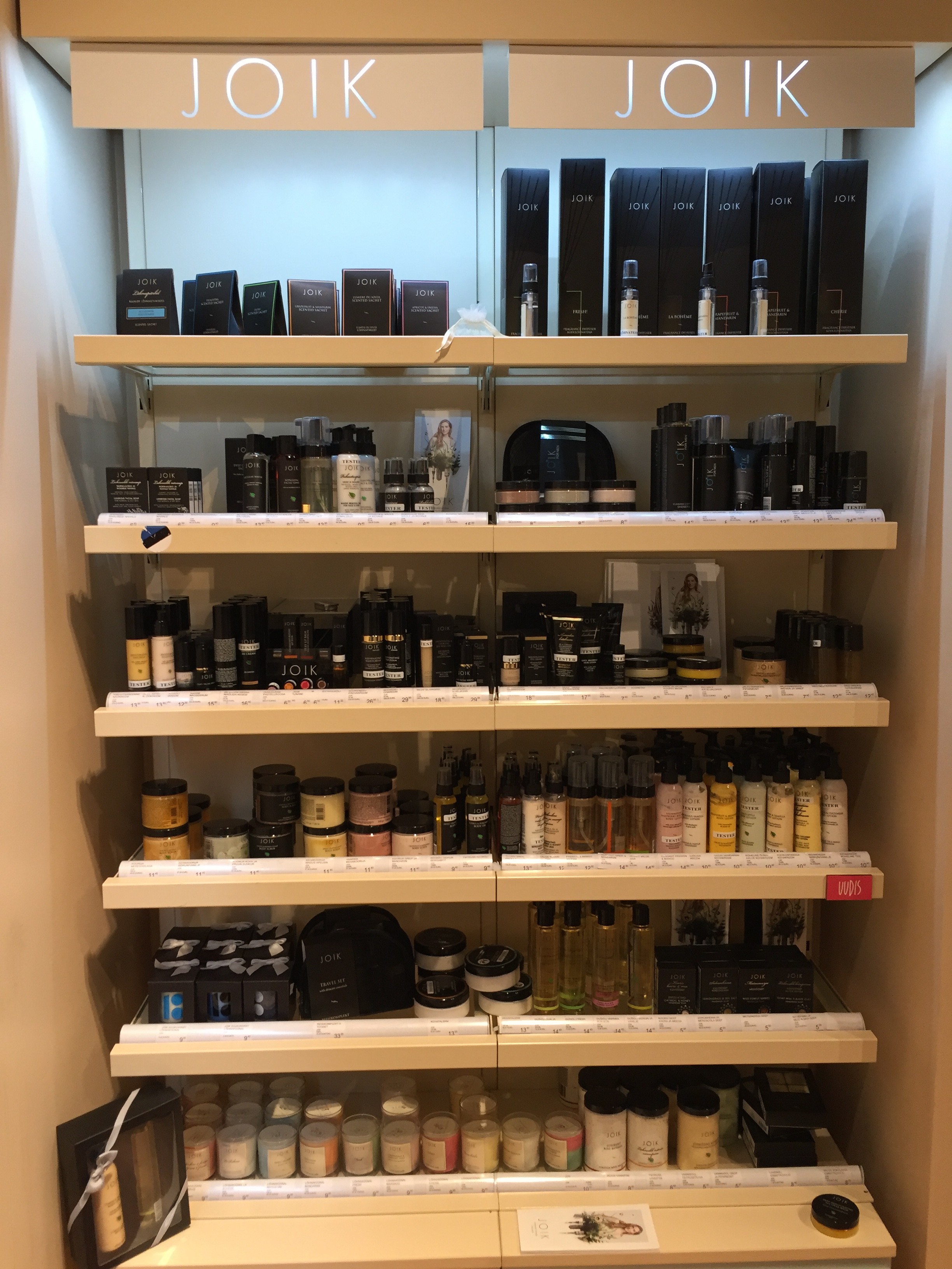 Kosmeetika